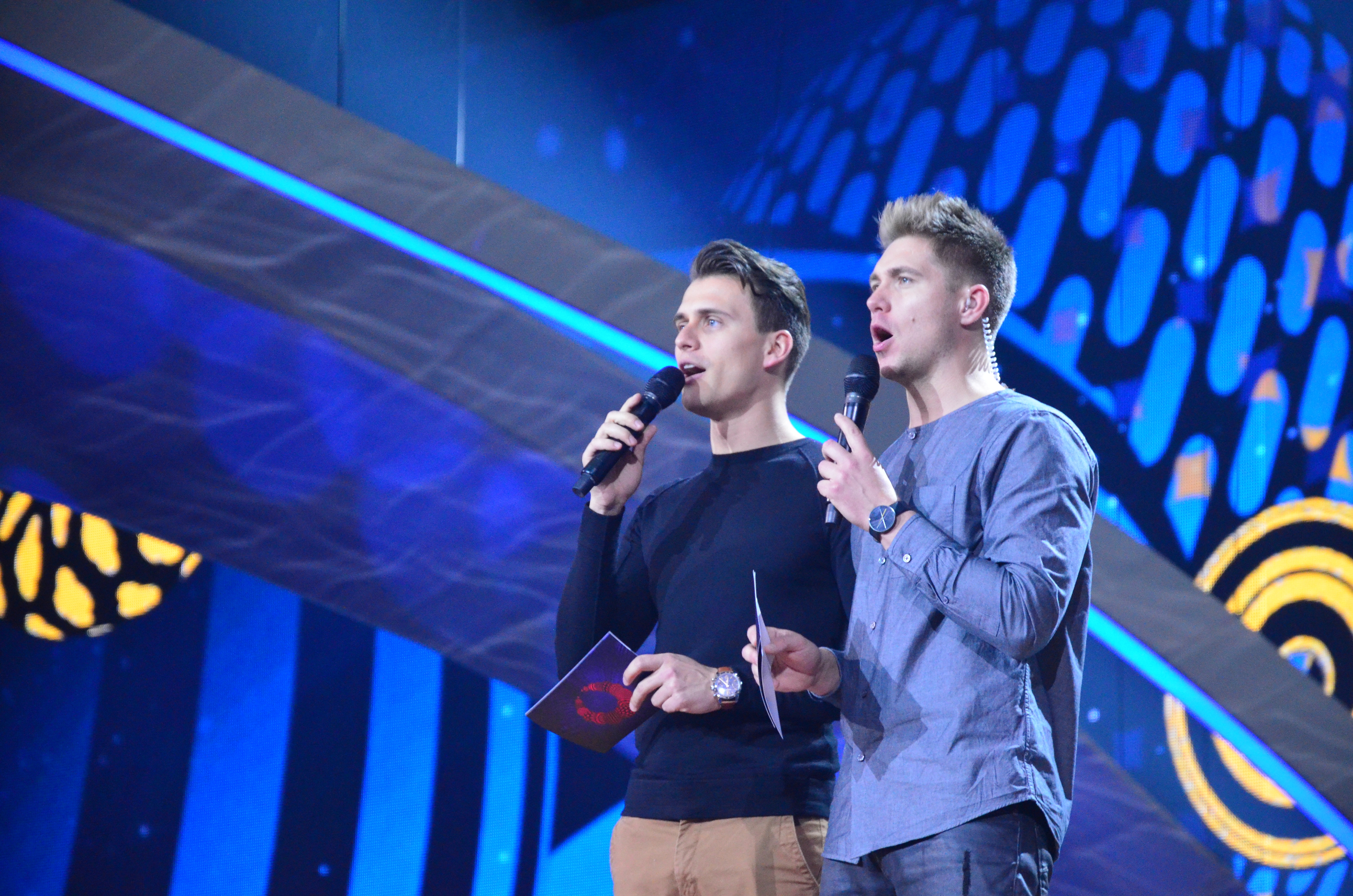 10 травня 2017 року у Києві відбулась генеральна репетиція 2 півфіналу "Євробачення".